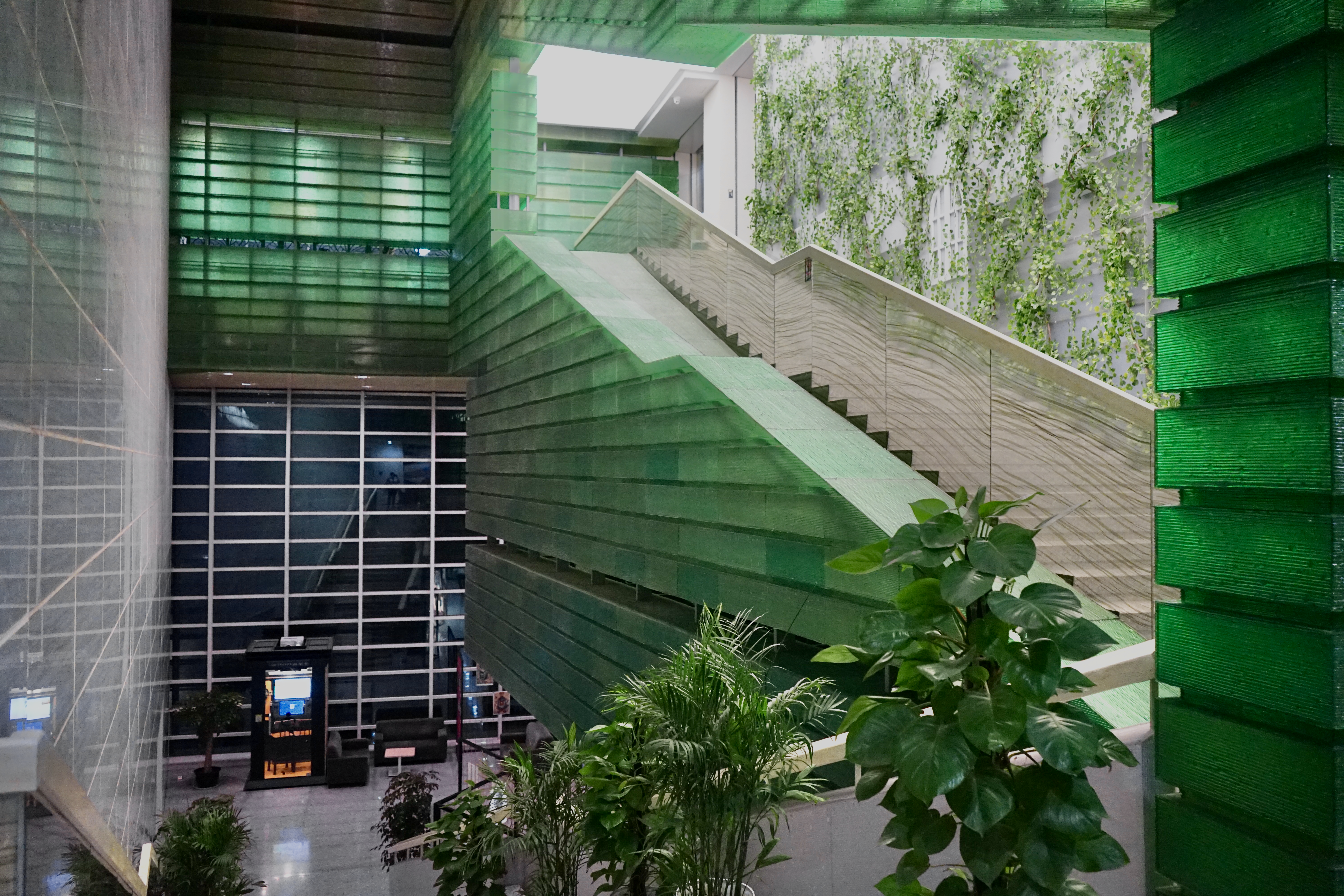 中文（中国大陆）: 海宁图书馆